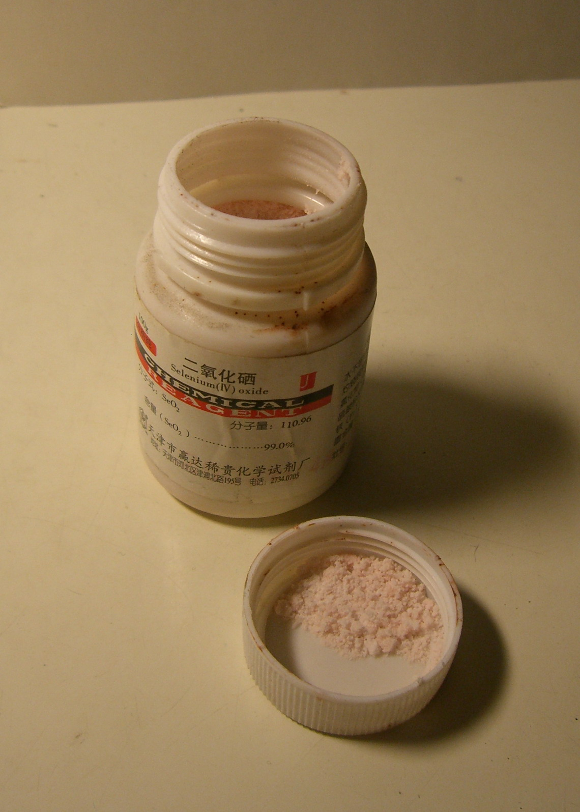 Selenium dioxide